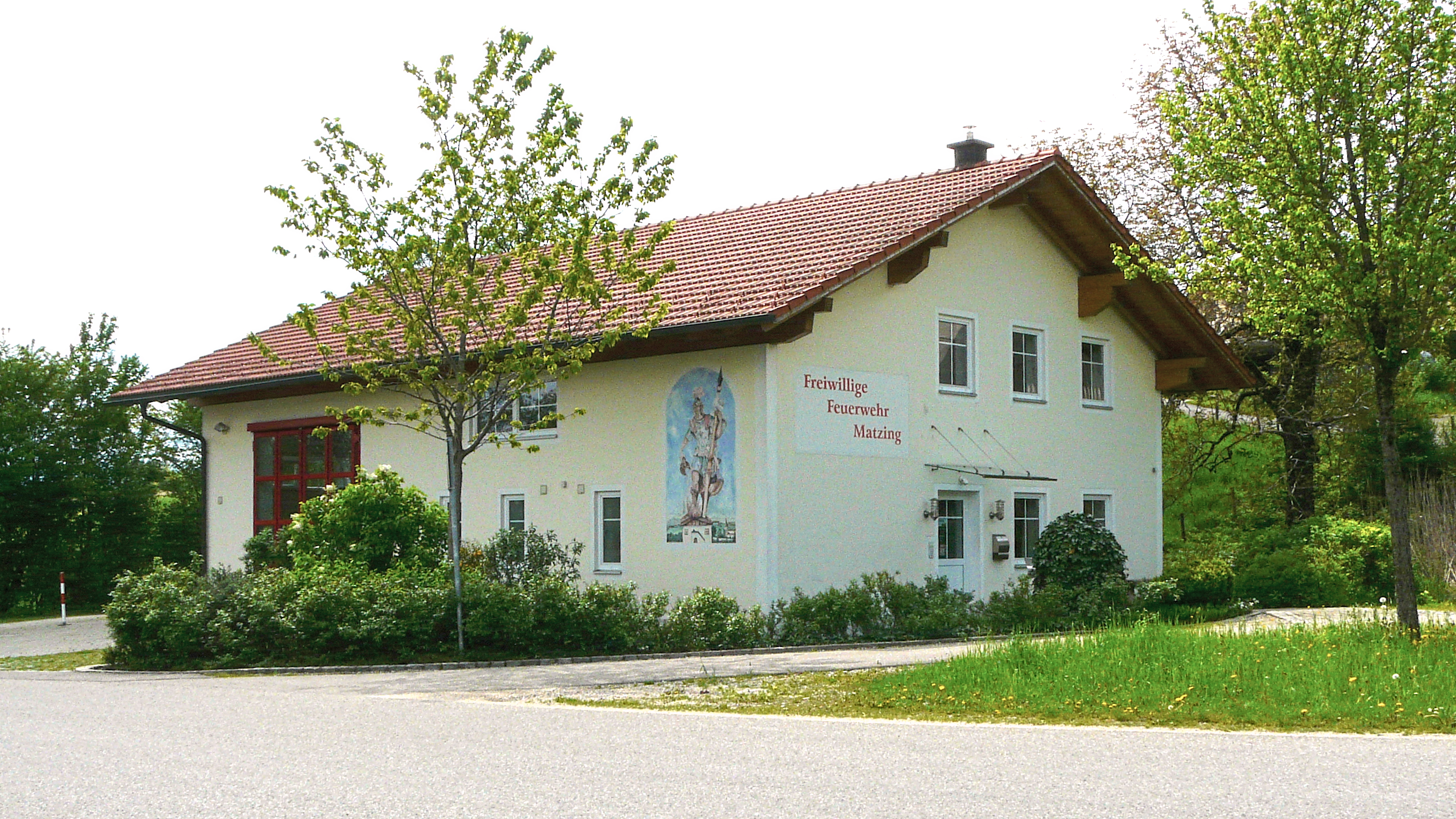 Gerätehaus der Freiwillige Feuerwehr Matzing, Ortsteil von Traunreut